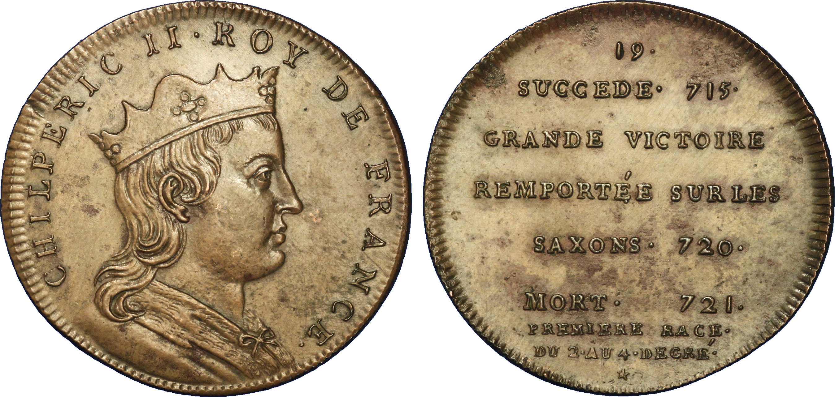 Métal : cuivre rouge Diamètre : 32mm Axe des coins : 12h. Poids : 10,08g. Tranche : cannelée Titulature avers : CHILPERIC II ROY DE FRANCE. Description avers : Buste imaginaire drapé et couronné à droite. Titulature revers : 19 - SUCCEDE 715 - GRANDE VICTOIRE REMPORTÉE SUR LES SAXONS 720 - MORT 721 - PREMIERE RACE DU 2 AU 4 DEGRÉ / *. Description revers : en huit lignes.